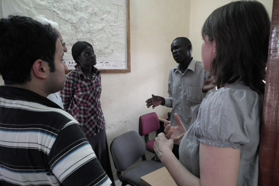 Das Foto zeigt Niema Movassat und Christine Buchholz bei der Besichtigung eines GTZ Projektes im Bereich der Polizeiausbildung in Juba. Im Rahmen des besuchten Projektes werden Funker ausgebildet. Durch den Ausbau eines landesweiten Polizeifunks soll die Vernetzung und Kommunikation verbessert werden. Denn der Südsudan ist so groß wie Frankreich, hat aber kaum Kommunikationskanäle oder asphaltierte Straßen. Informationen von einem Landesteil zum nächsten können Tage brauchen. Insgesamt stellt sich die Situation der Polizei im Südsudan recht negativ dar: Ca. 2/3 der Polizisten sind ausgemusterte Ex-SPLAler ohne eine Polizeiausbildung. Alsbald sollen aus dem Polizeiausbildungsprogramm frisch ausgebildete Rekruten den Dienst aufnehmen. Diese werden dann 1/3 der südsudanesischen Polizei ausmachen. Foto: DIE LINKE